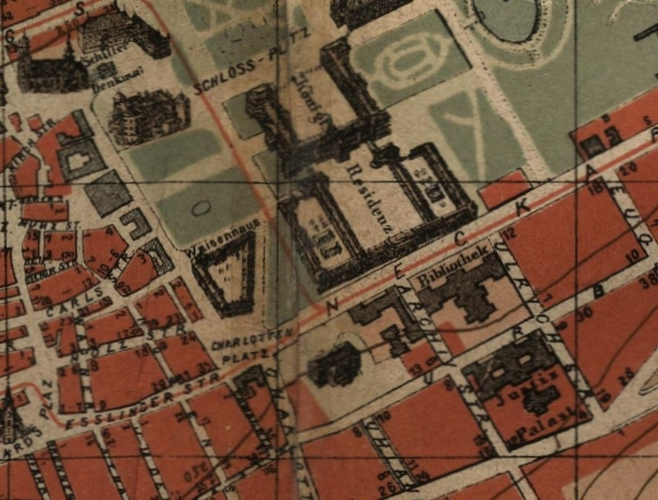 Ausschnitt aus dem Stadtplan von Stuttgart, 1884.